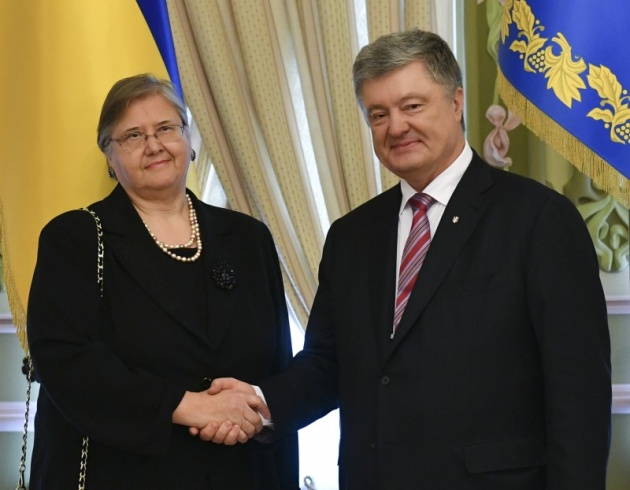 Президент України Петро Порошенко прийняв вірчі грамоти у послів низки іноземних держав: Хорватії - Аніца Джамич